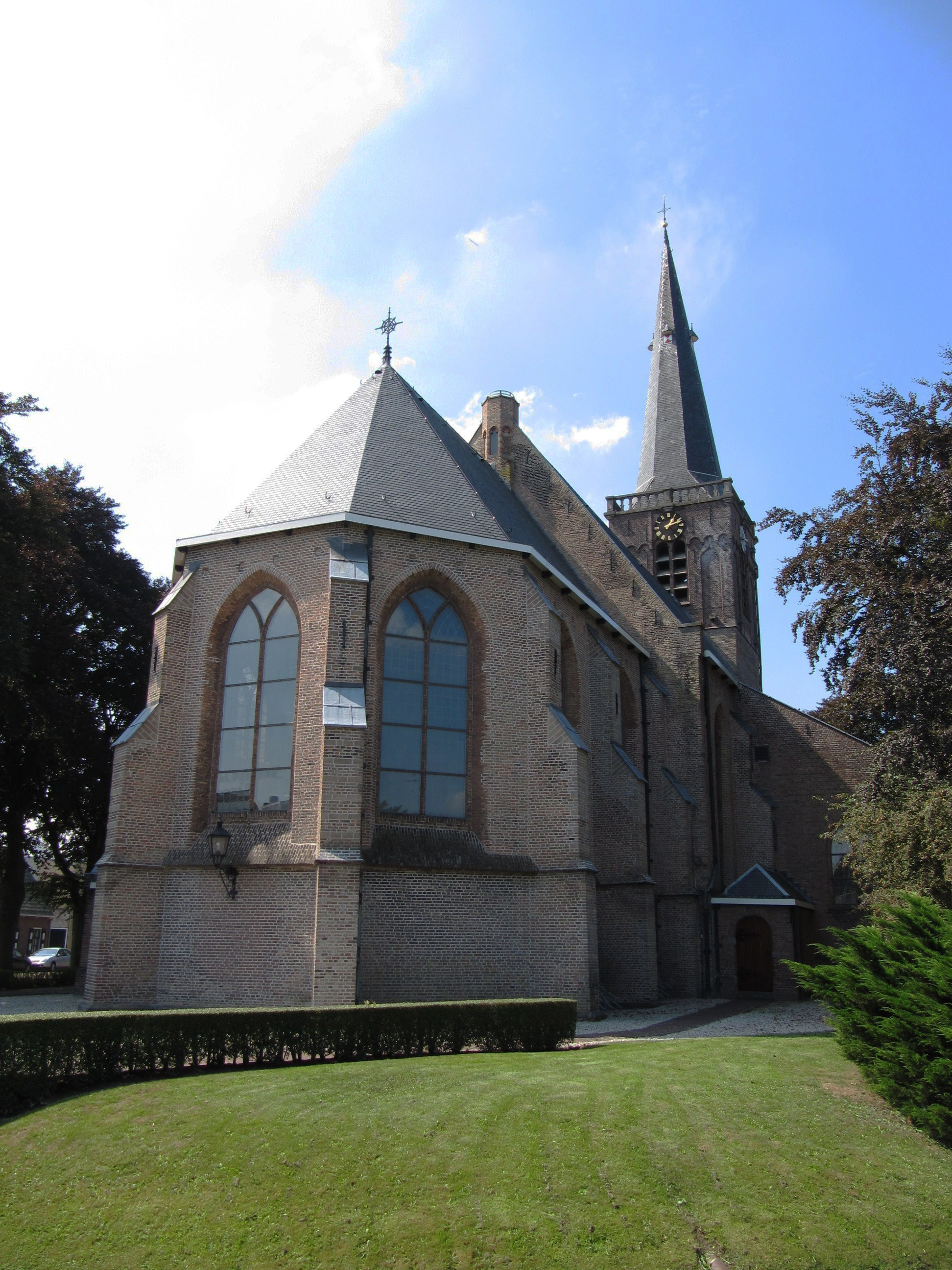 Ridderkerk - Kerksingel 1.jpg, rijksmonument